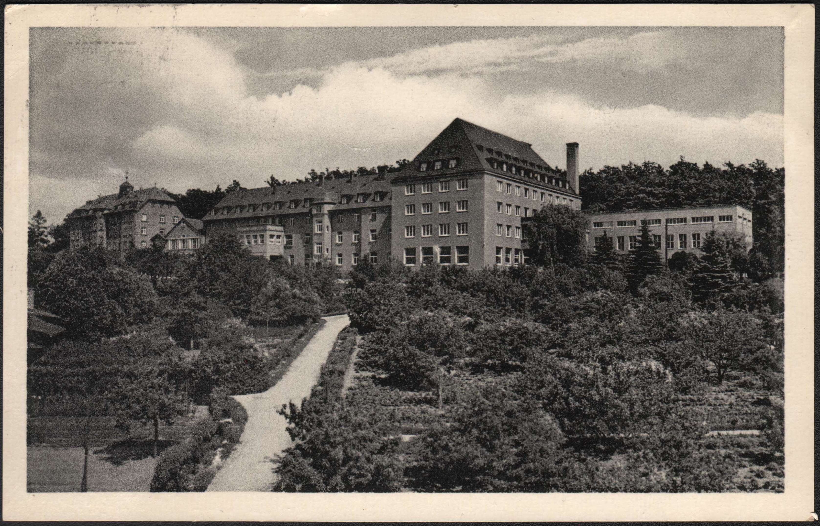 Hensoltshöhe, Gunzenhausen, Verlag Fritz Lauterbach.